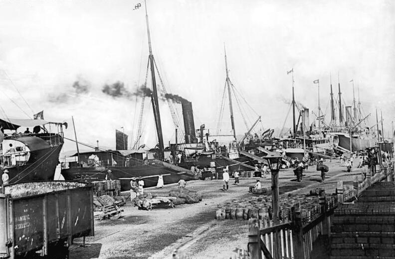 Tsingtau, Löschen und Laden im Hafen China,Tsingtau.- Löschen und Laden im Hafen von Tsingtau.